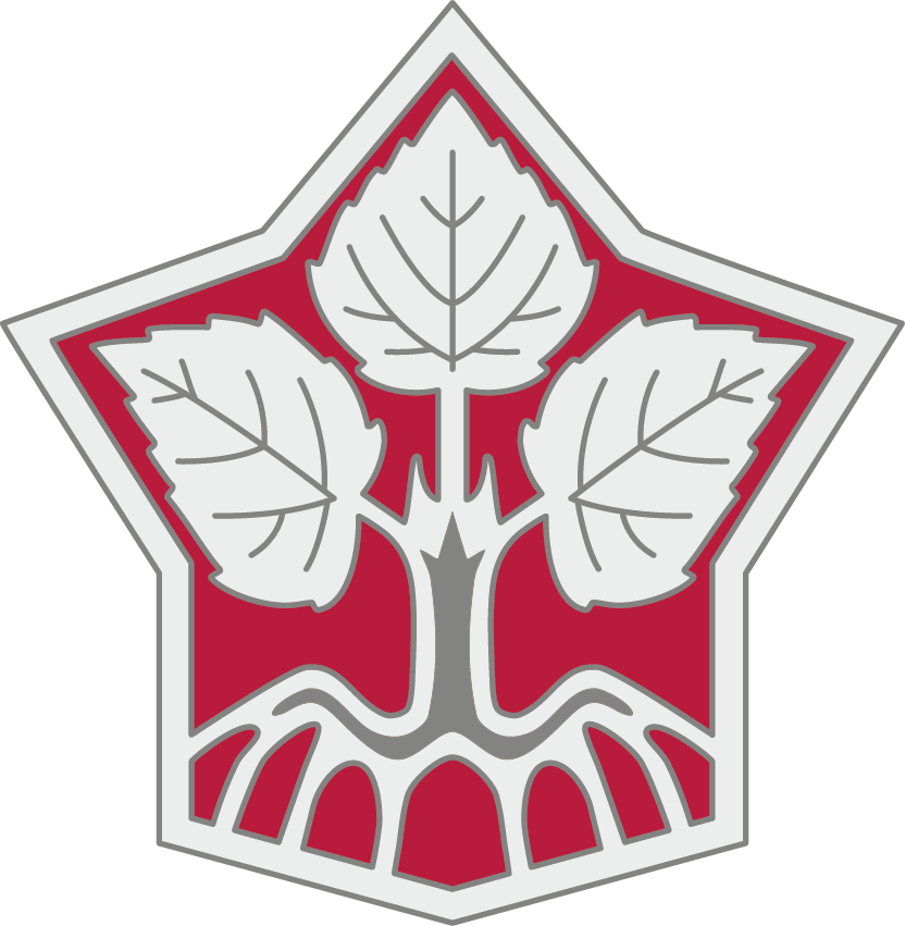 Das Symbol der Domowina stellt auf rotem Untergrund drei hellgraue Lindenblätter dar, welche aus einem dunkelgrauen Stamm mit acht Wurzeln neu hervorsprießen. Die Wurzeln sind in der Umrahmung fest verankert. Das Logo ist beim Deutschen Patent- und Markenamt des Bundes gesetzlich geschützt.